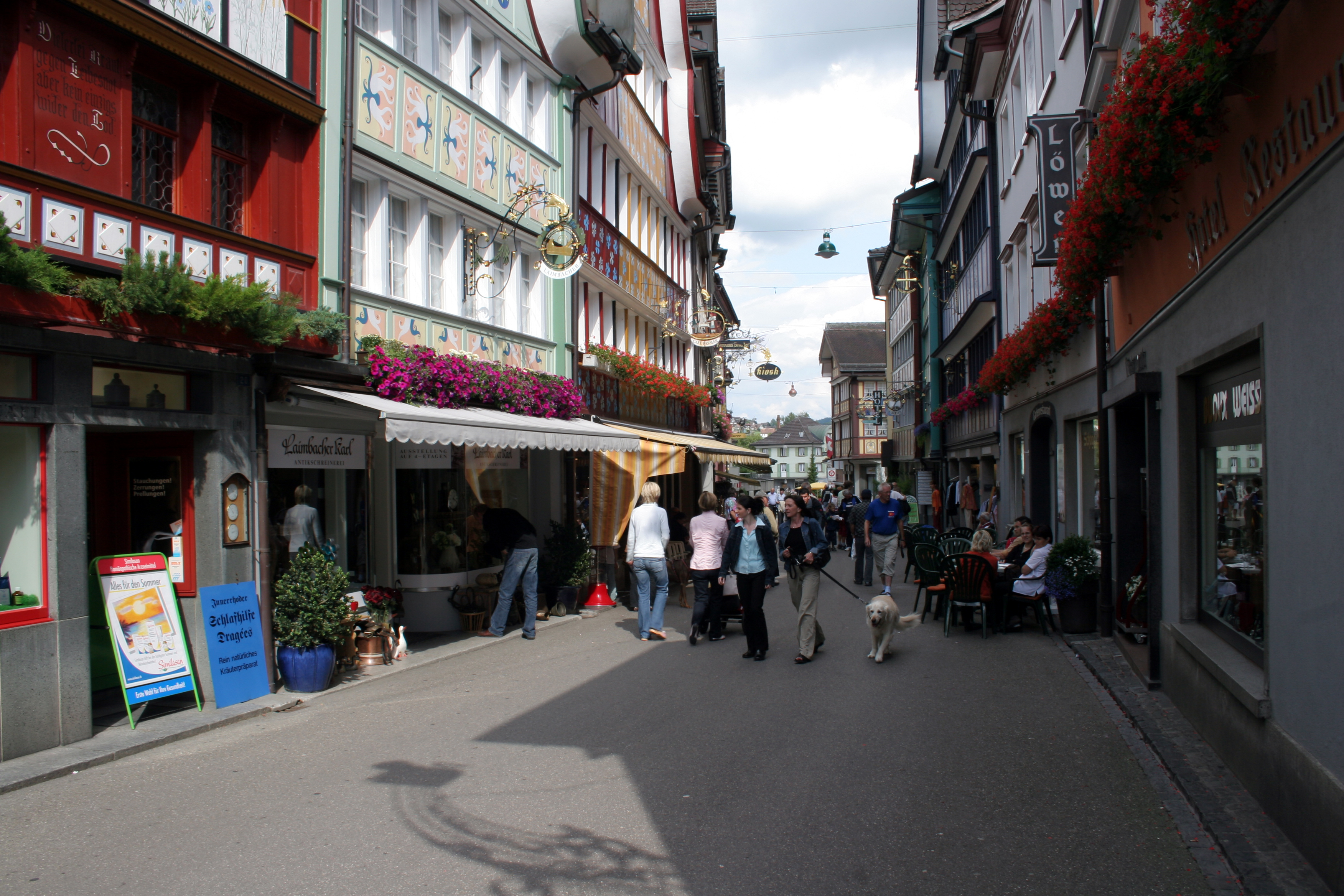 Street in Appenzell, AI, Switzerland in July 2005.